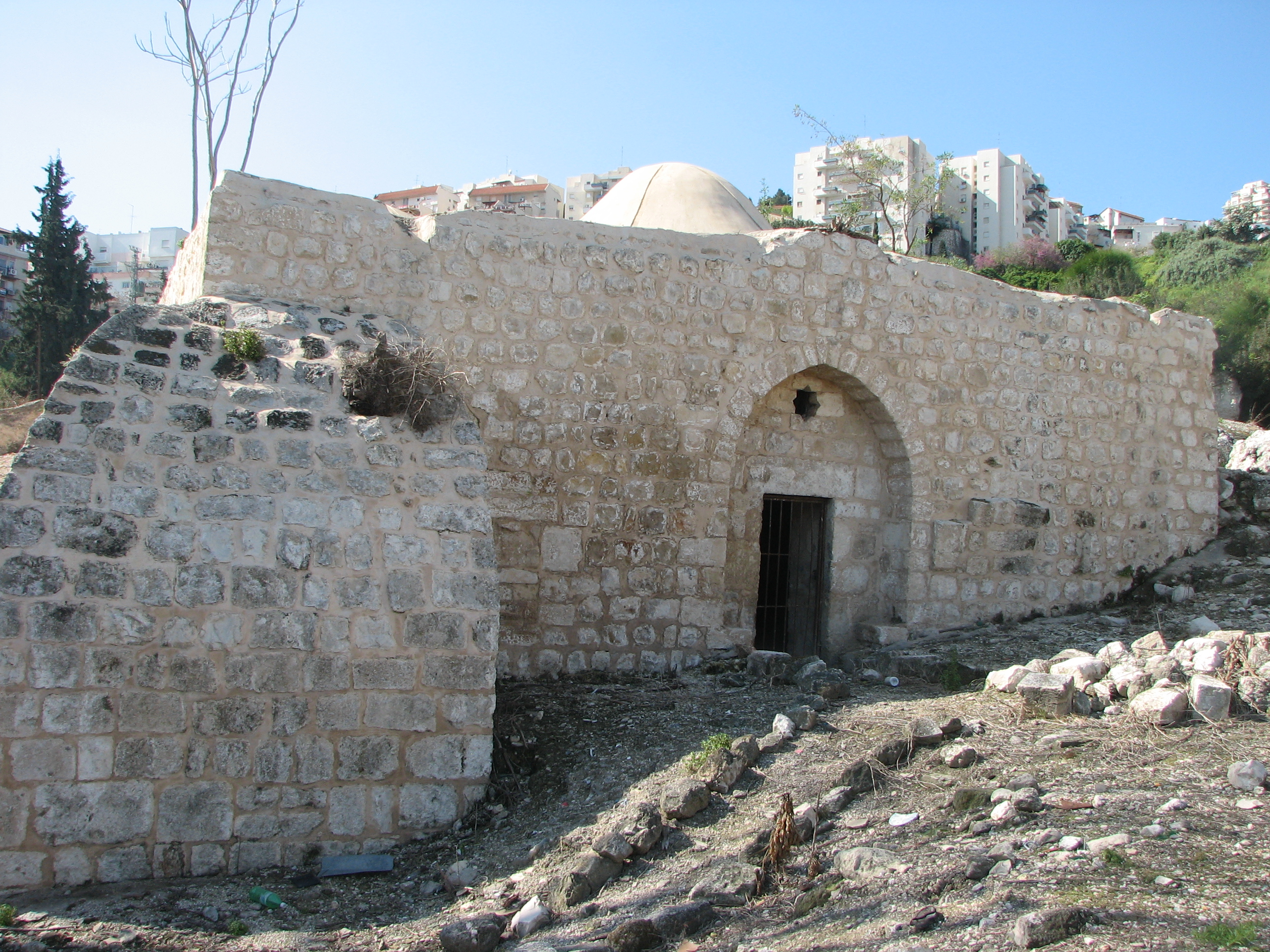 The City Nesher on Mount Carmel and Suburb: Tel Hanan תל חנן שכונה בעיר נשר. בתי השכונה נבנו על הכפר הערבי בלד א-שייח' שניטש באפריל 1948 יחד עם נטישת תושבי חיפה הערביים את חיפה. תל חנן יושבה על ידי עולים חדשים אשר התיישבו בבתים הנטושים. עם השנים נהרסו בתים אלה ונבנו שיכונים. קבר בבית הקברות המוסלמי בשכונת תל חנן. קברו של שייח' עבדאללה אל סהלי. היה שייח' דרווישי, איש דת סופי שחי בתחילת המאה ה-16